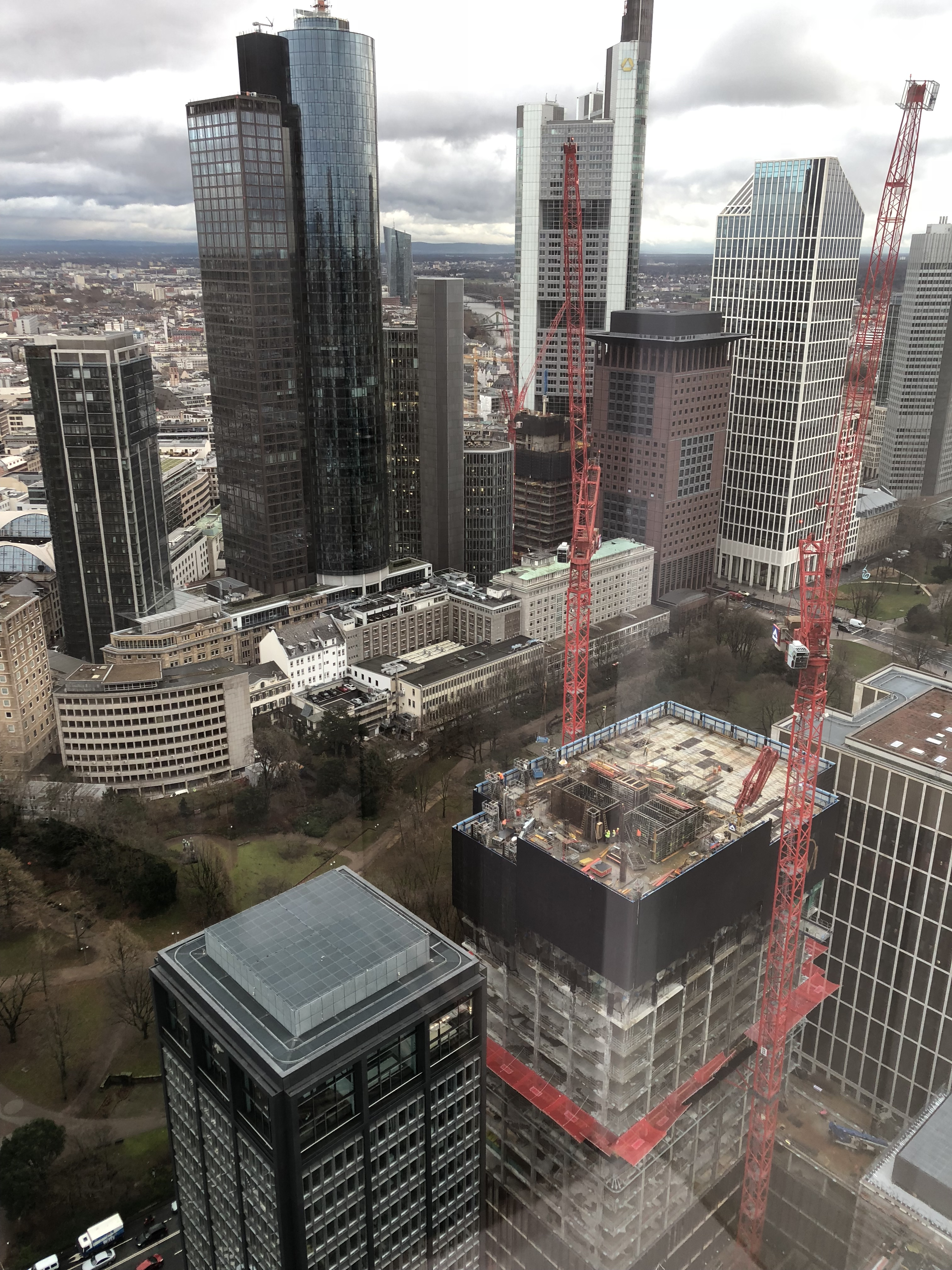 Sicht auf die Baustellen des Marienturm und des Omniturms aus dem Trianon, Ffm im Januar 2018.